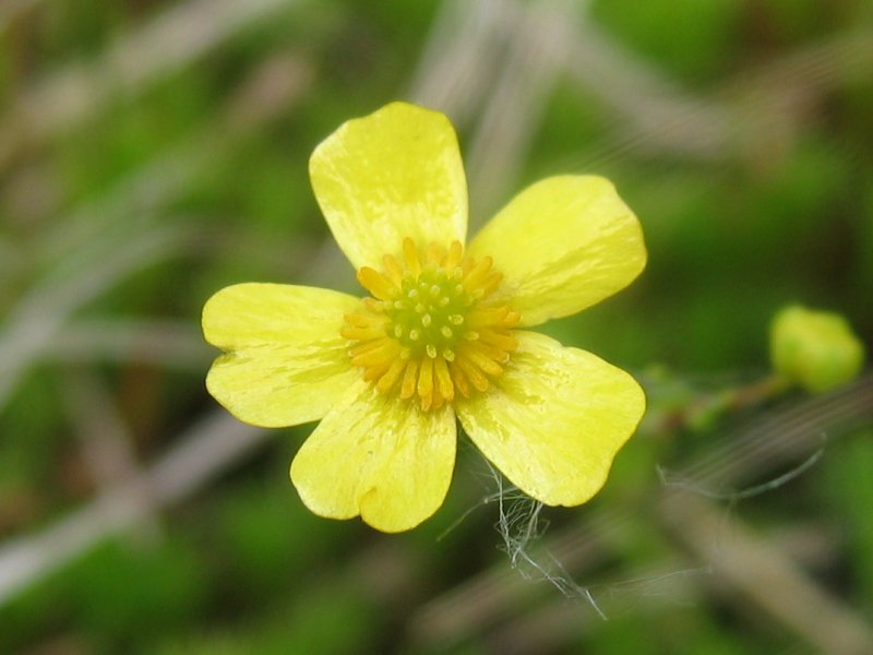 Brennender Hahnenfuß Ranunculus flammula, Zingst